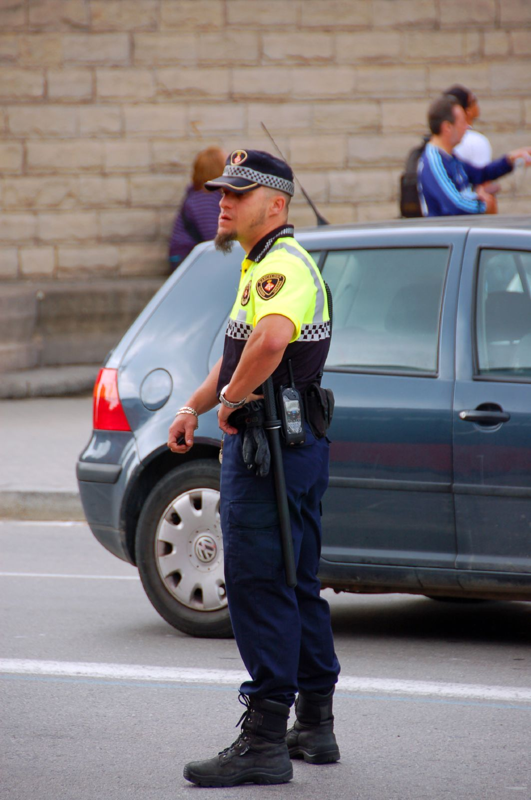 Guàrdia Urbana de Barcelona (Catalunya)